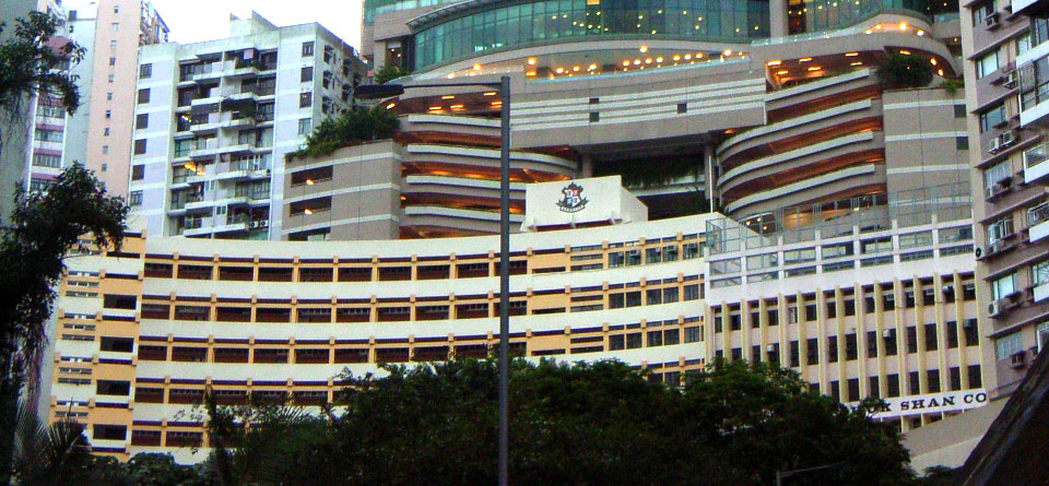 中文（香港）: 北角半山區寶馬山, 張祝珊英文中學